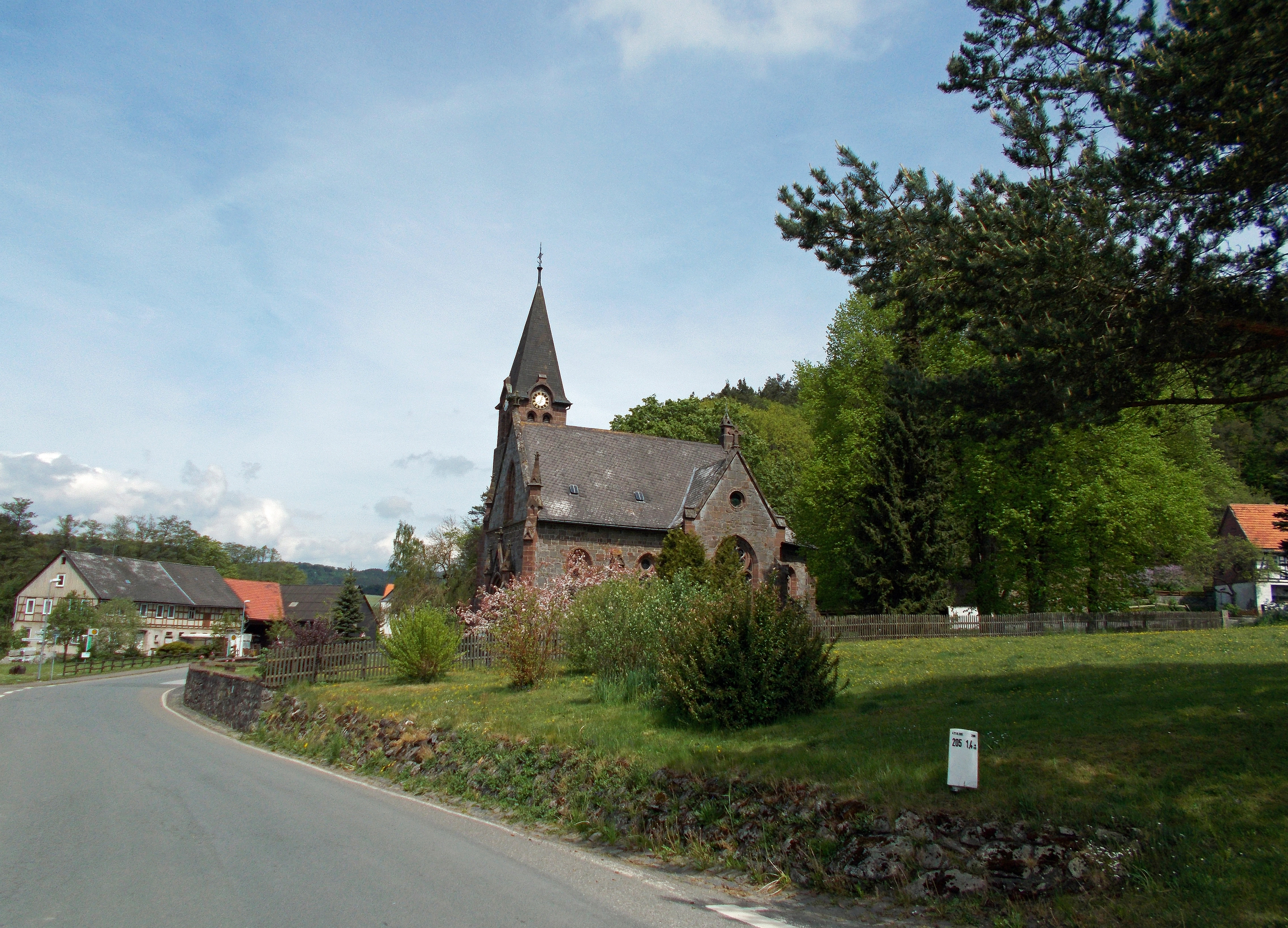 Louis-Peter-Kirche, Alleringhausen